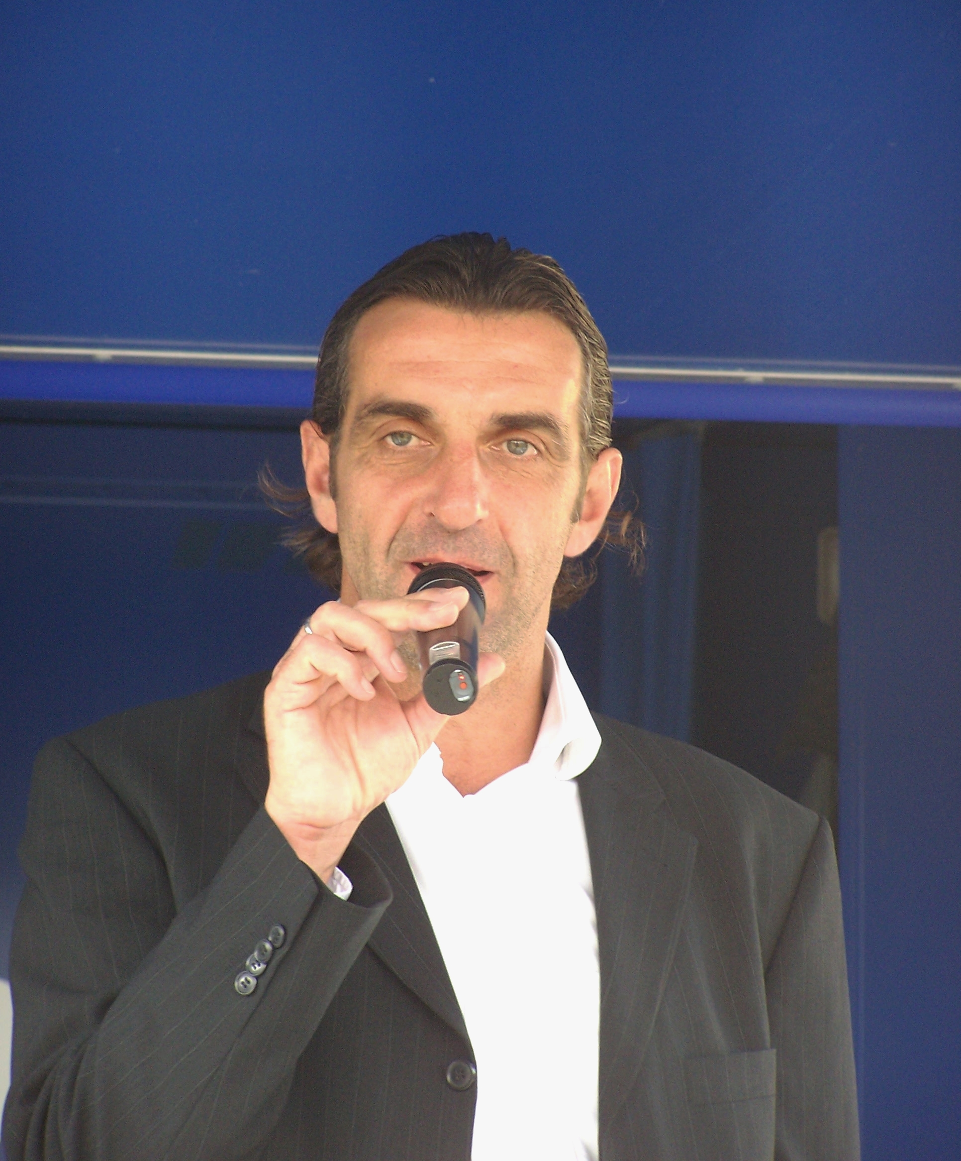 Sportdirektor Ralf Minge bei der Teampräsentation von Dynamo Dresden zum Start der Drittliga-Saison 2008/09